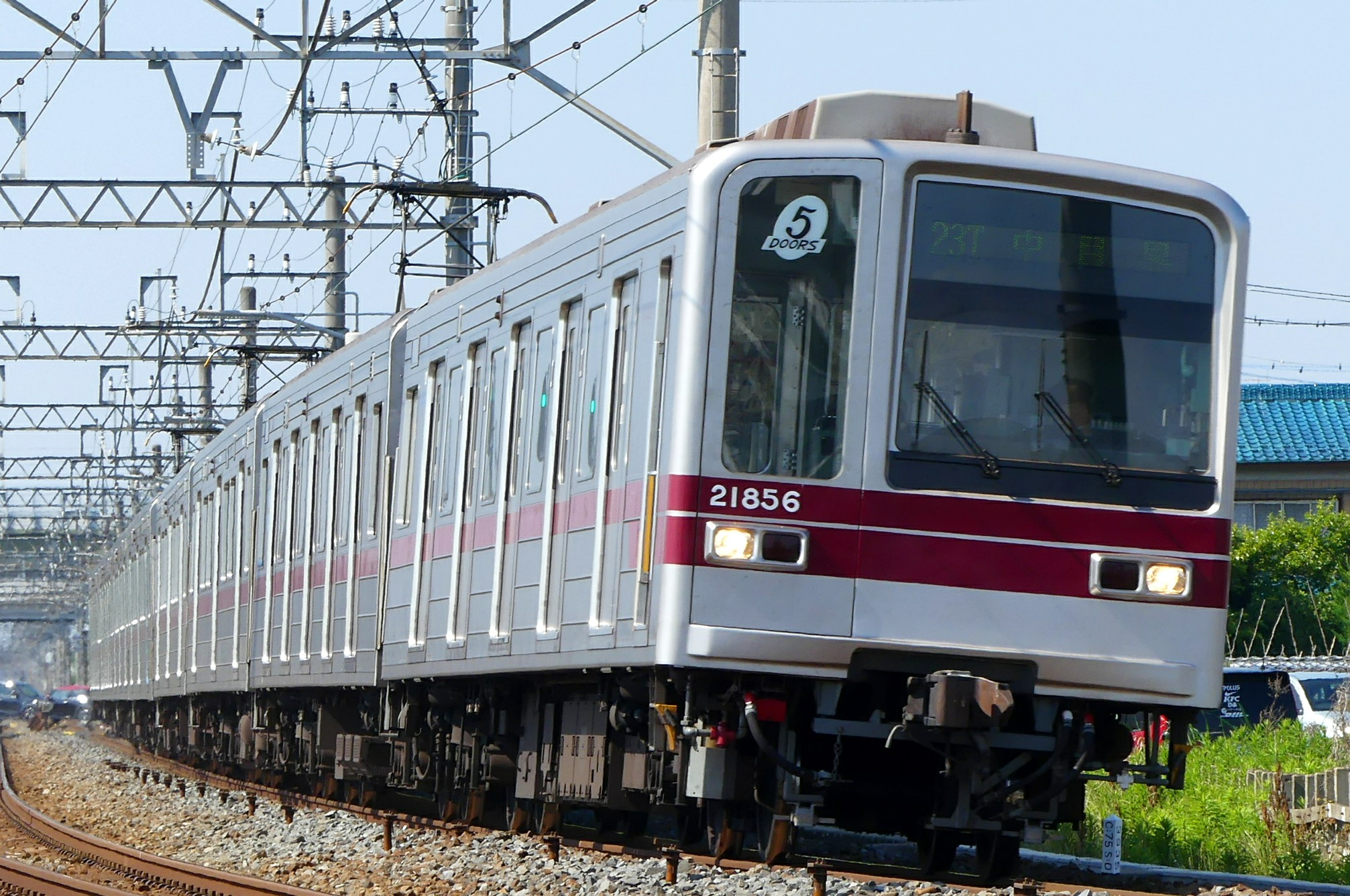 東武鉄道20050系21856編成